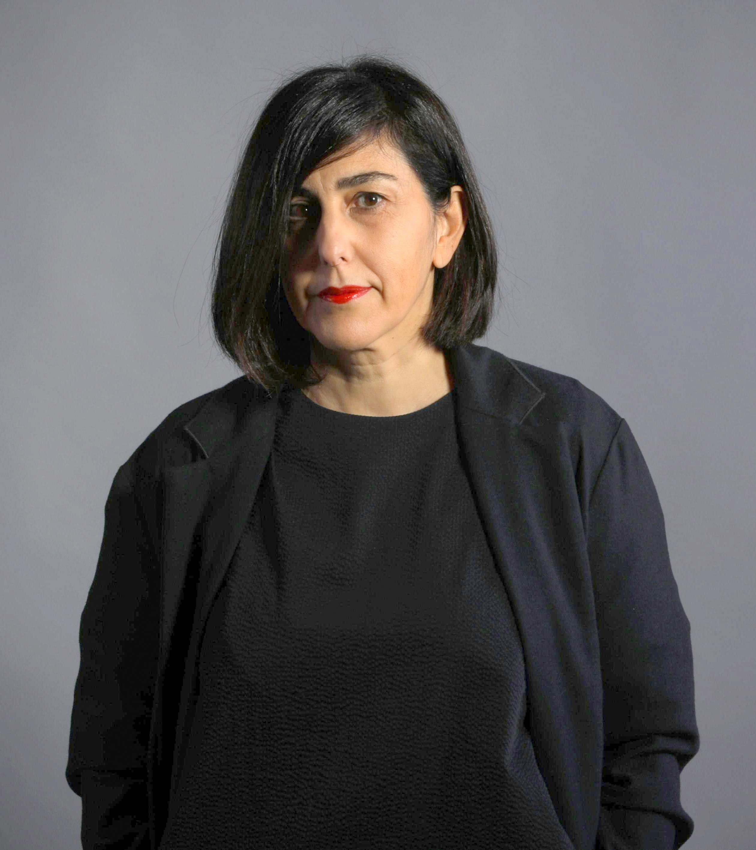 El Pabellón de los Jardines de Cecilio Rodríguez, en el Parque de El Retiro, ha sido el escenario para la presentación de las nuevas direcciones de seis grandes centros culturales municipales. La alcaldesa de Madrid, Manuela Carmena, les ha dado la bienvenida a la ciudad. La música del productor y músico Suso Saiz, y las palabras del novelista y poeta Benjamín Prado, les han acompañado en este encuentro.